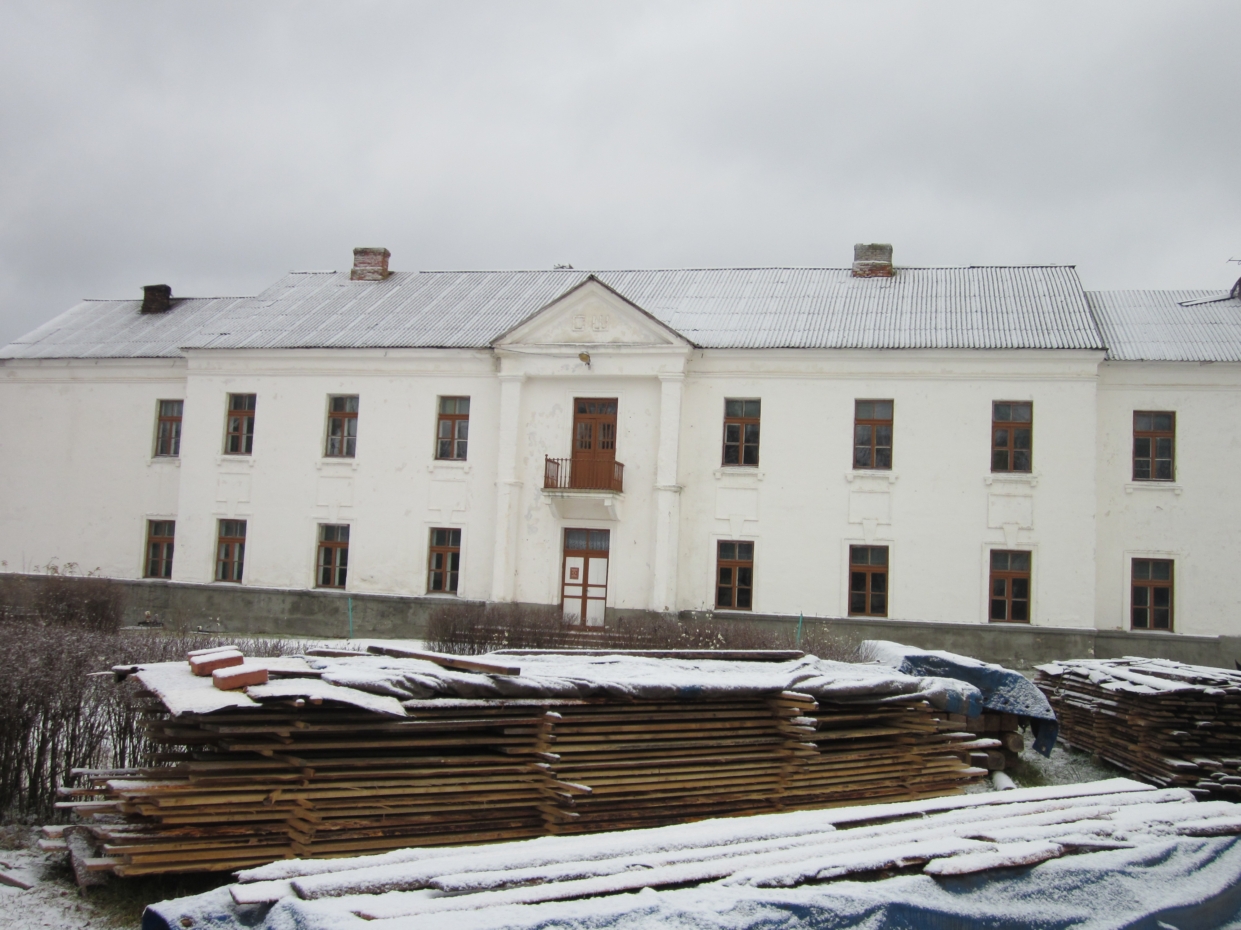 Беларуская (тарашкевіца): Фрагмэнты замка:дзьве вежыземляныя ўмацаваньні з рэшткамі абарончых збудаваньняўбылы палацфлігель. г. п. Любча This is a photo of Belarusian heritage monument. Reference number: 412Г000453 ( WLM)